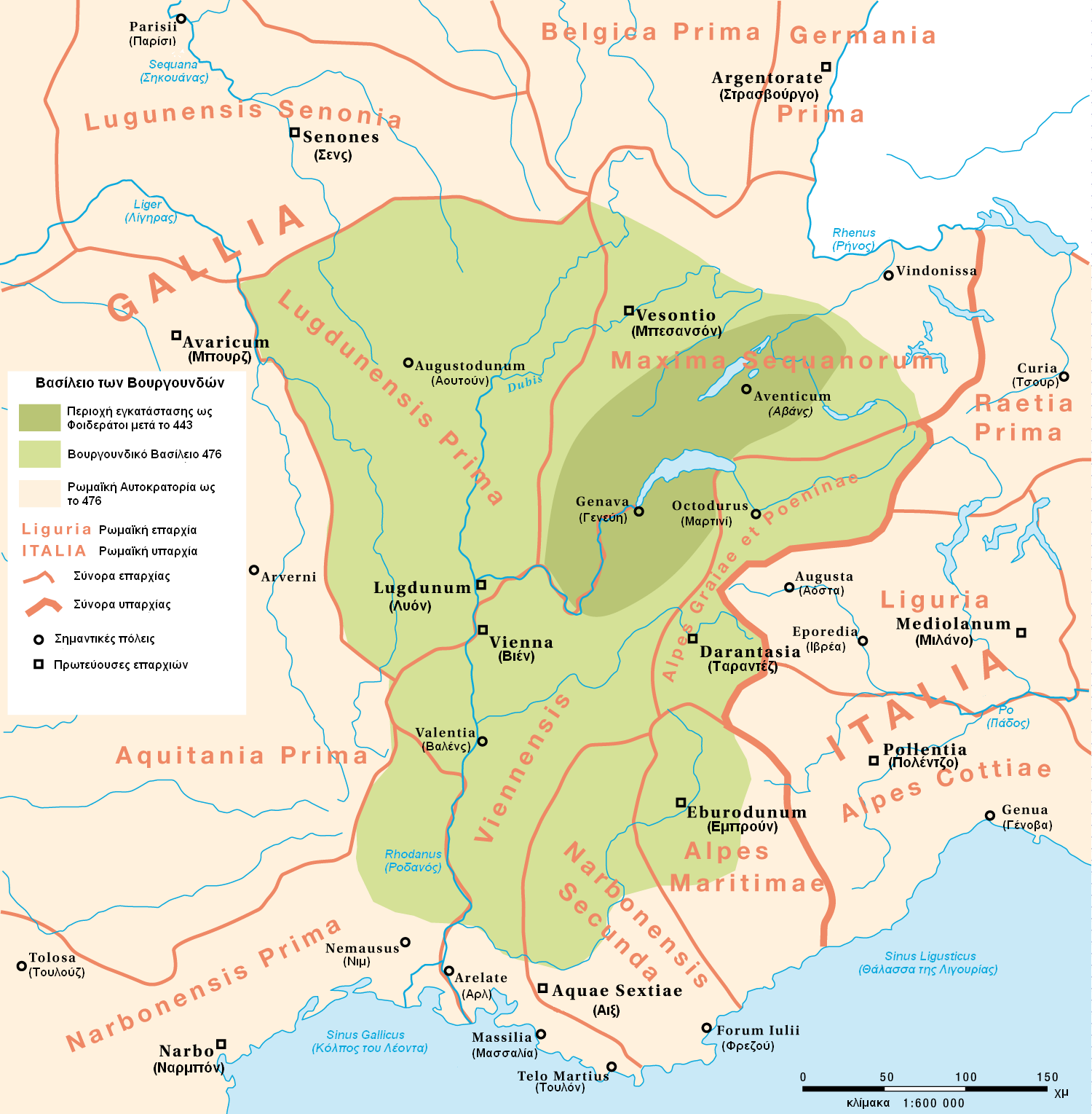 Το Βασίλειο των Βουργουνδών 443-476